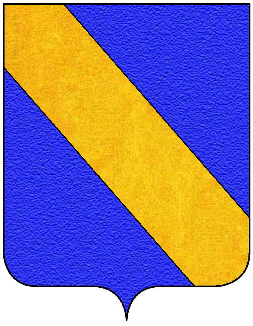 Stemma della famiglia Camajani